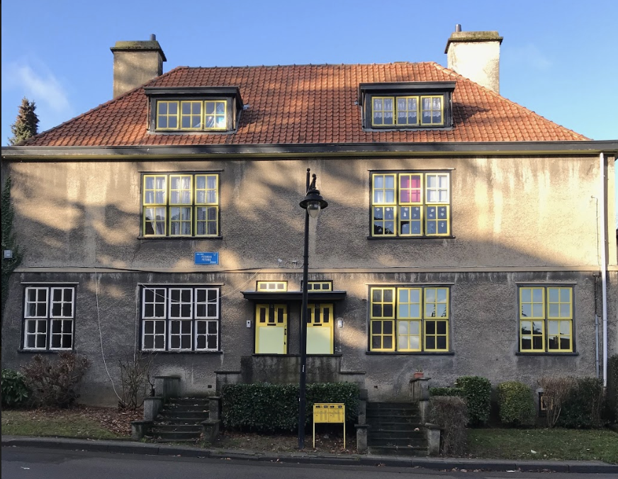 Maisons de la cité jardin du Floréal